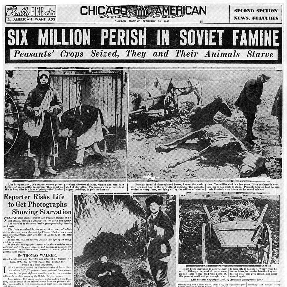 Газета Chicago American від 25.02.1935 з інформацією про Голодомор